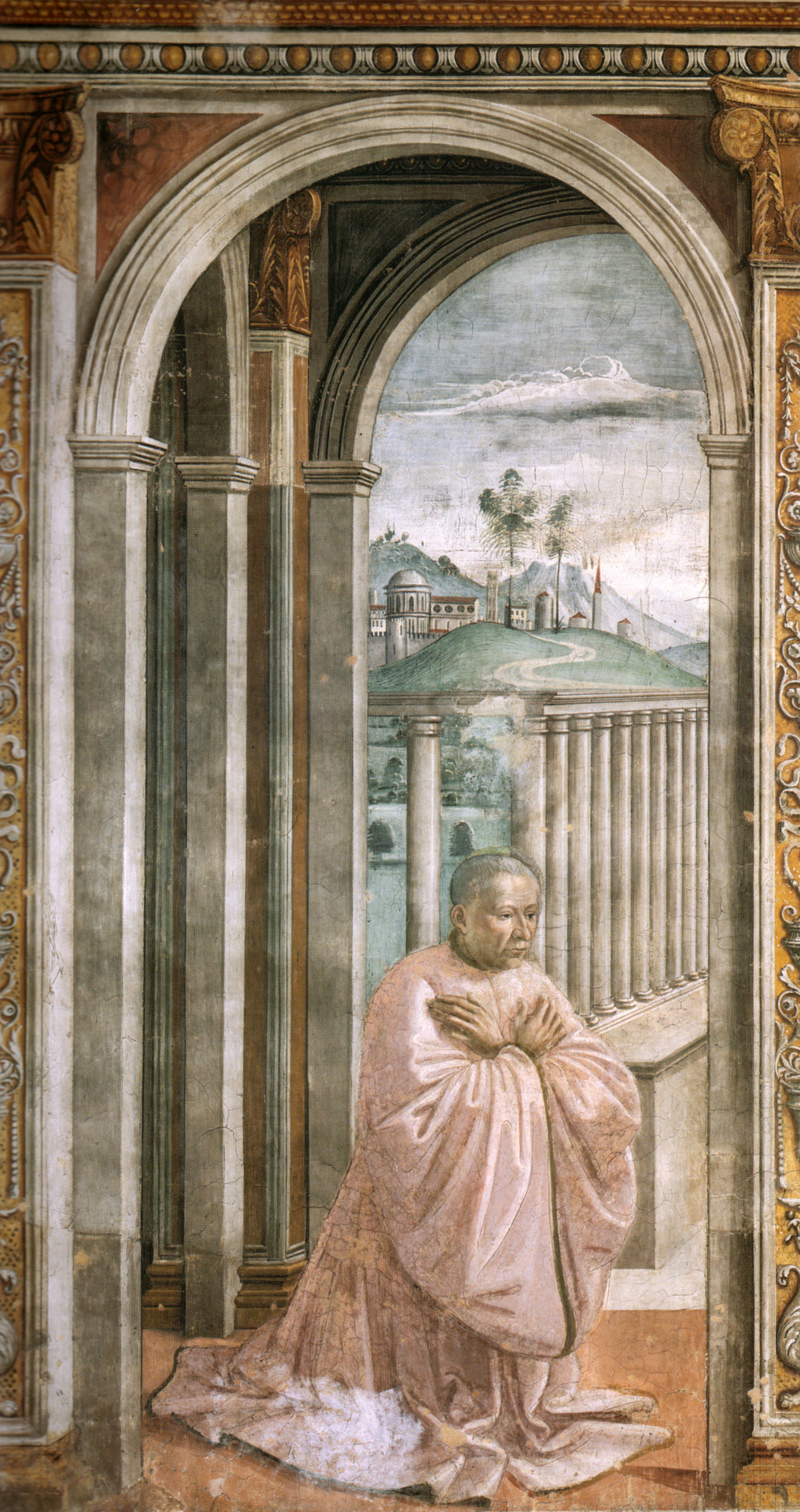 cappella tornabuoni frescoes in Florence